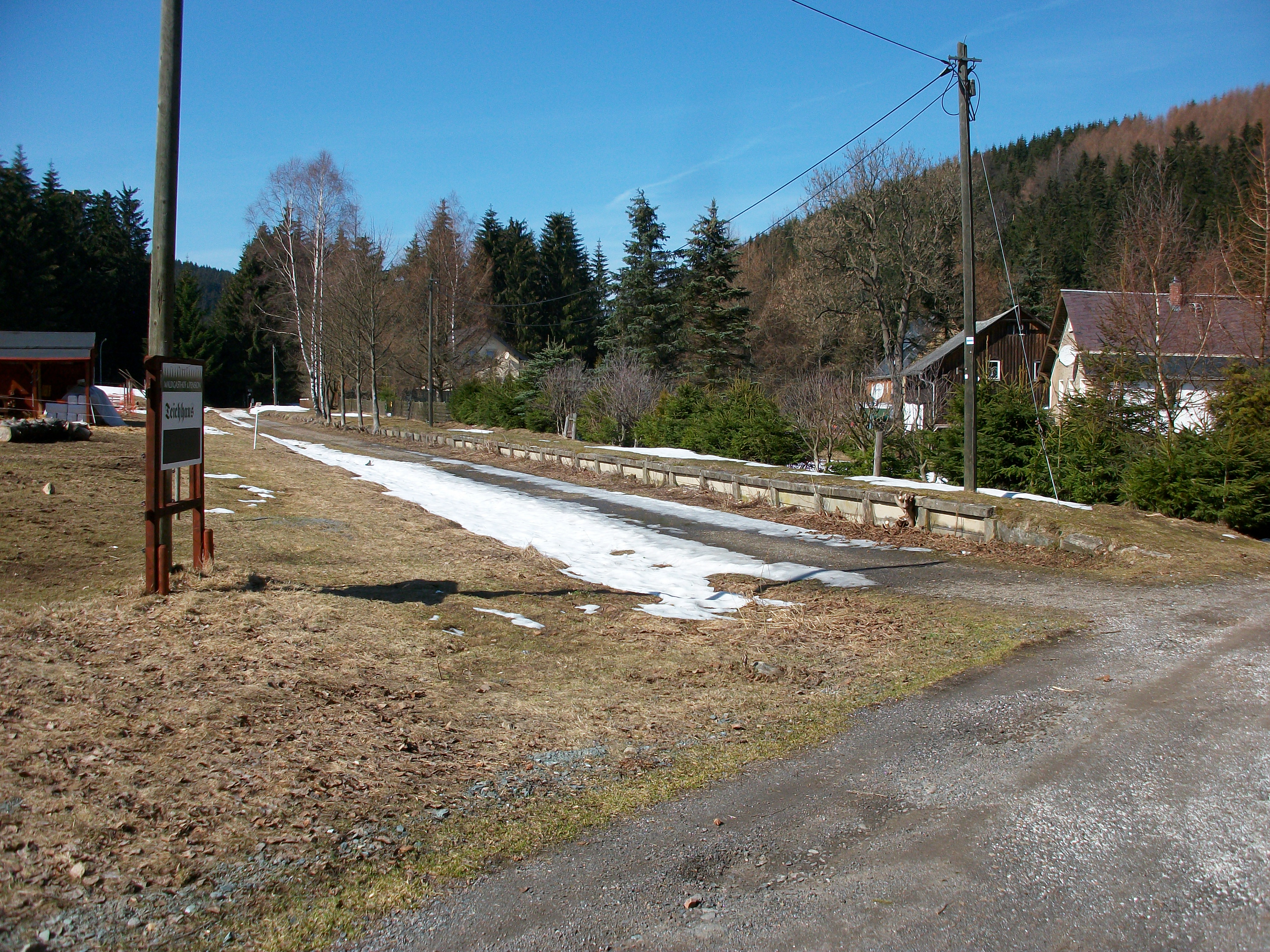 Ehemaliger Haltepunkt Teichhaus (2019)